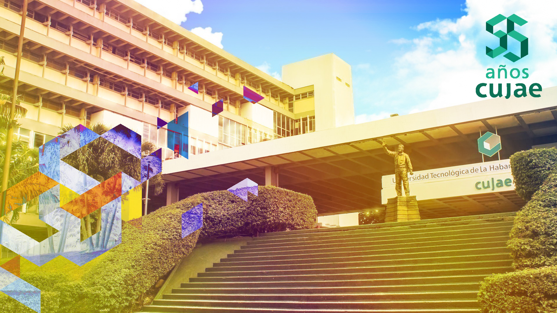 Entrada Principal de la CUJAE, Aniversario 55 de la Cujae